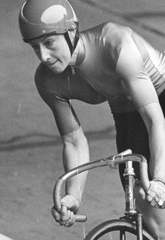 Christa Rothenburger ADN-ZB Kluge 26.6.87 Leipzig: 39. DDR-Meisterschaften im Bahnradasport - Am zweiten Wettkampftag verteidigte Radsprint-Weltmeisterin Chtista Rothenburger (SC Einheit Dresden) in der neuen Bahnrekordzeit von 37,2 s ihren Titel im 500 m Zeitfahren. Die Eisschnellauf-Olympiasiwegerin wechselte damit erneut erfolgreich das Metier.